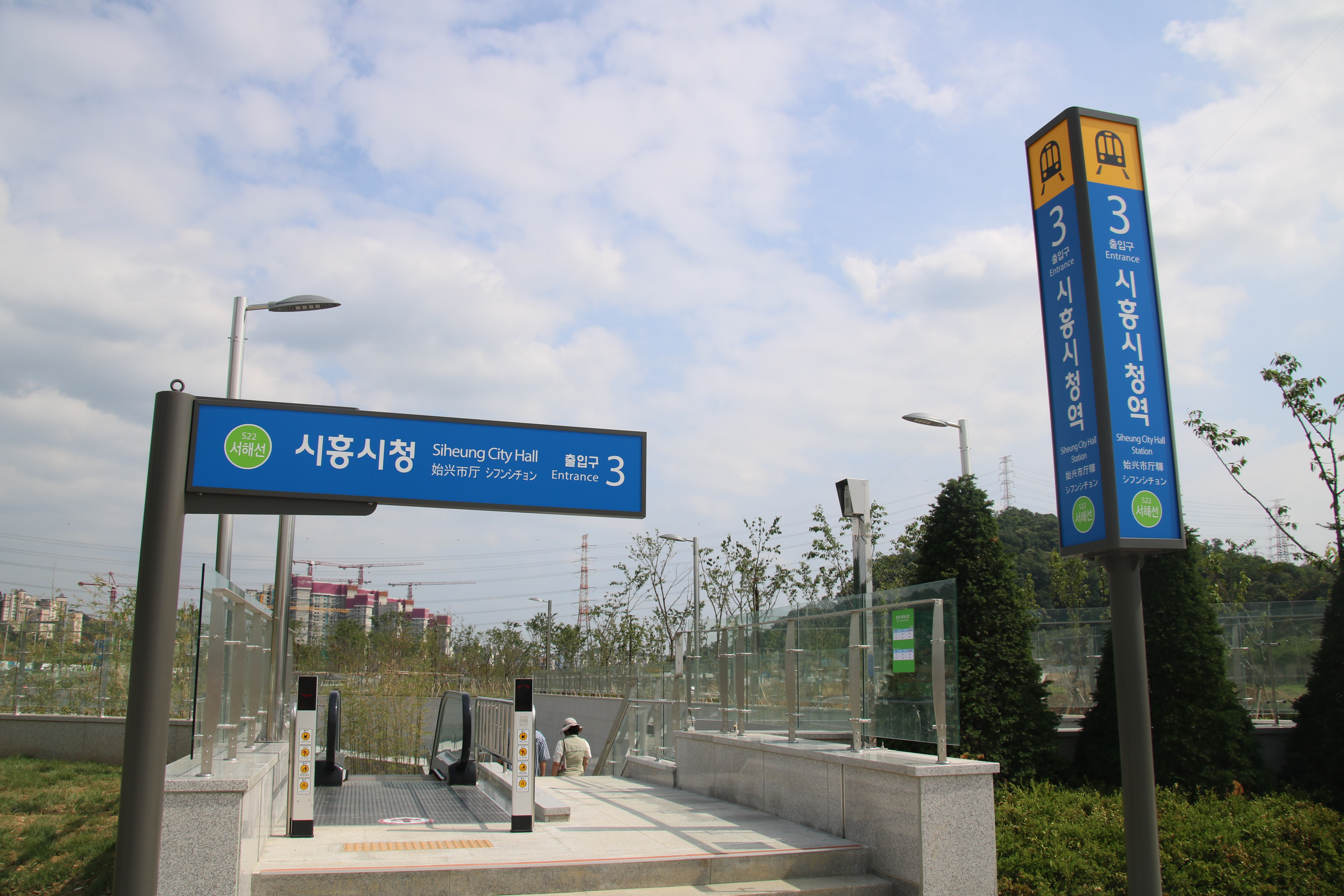 시흥시청역 3번 출입구